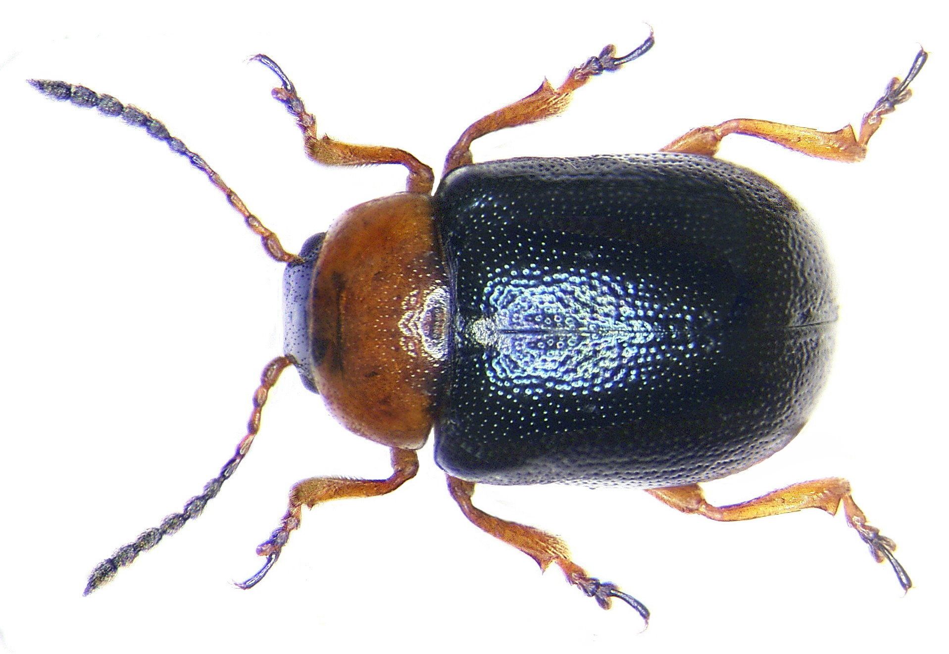 Gastrophysa polygoni (Linné, 1758) Familie: Chrysomelidae Groesse: 4-5 mm Verbreitung: Europa Ökologie: an Rumex- und Polygonum-Arten Fundort: Germania, Bayern, Oberfranken, Selbitz leg. det. U.Schmidt, 1974 Foto: U.Schmidt, 2005